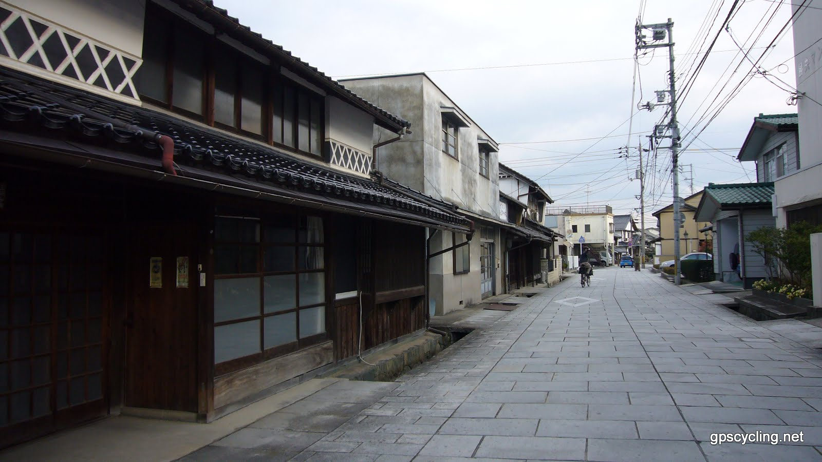 勝央町勝間田